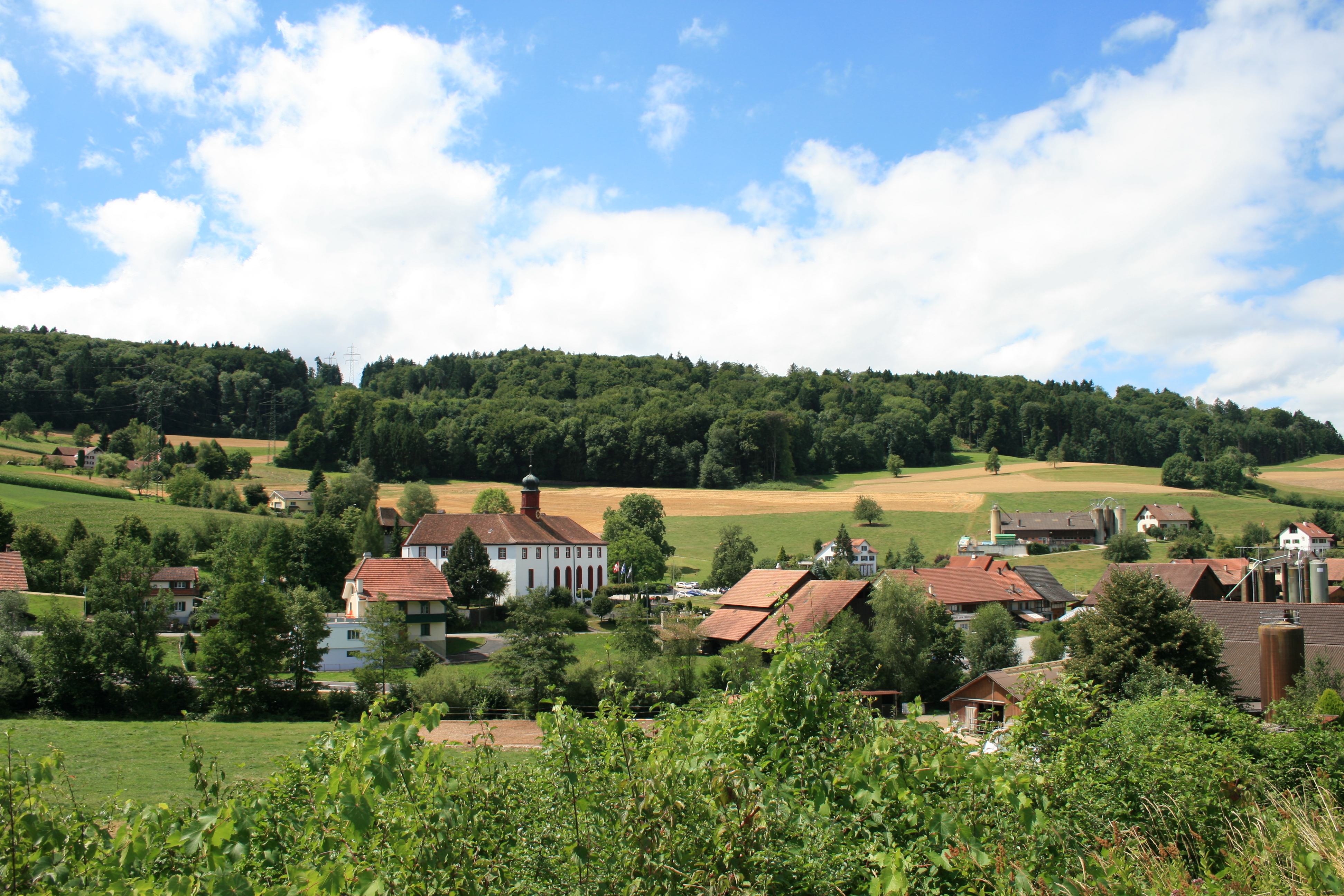 Dorf Wislikofen mit Propstei, Schweiz